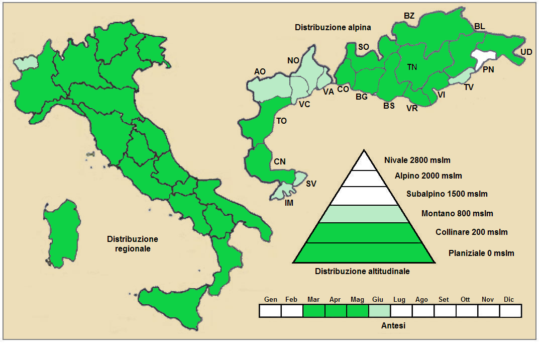 Forasacco dei muri (Bromus madritensis) - Distribuzione italiana della pianta